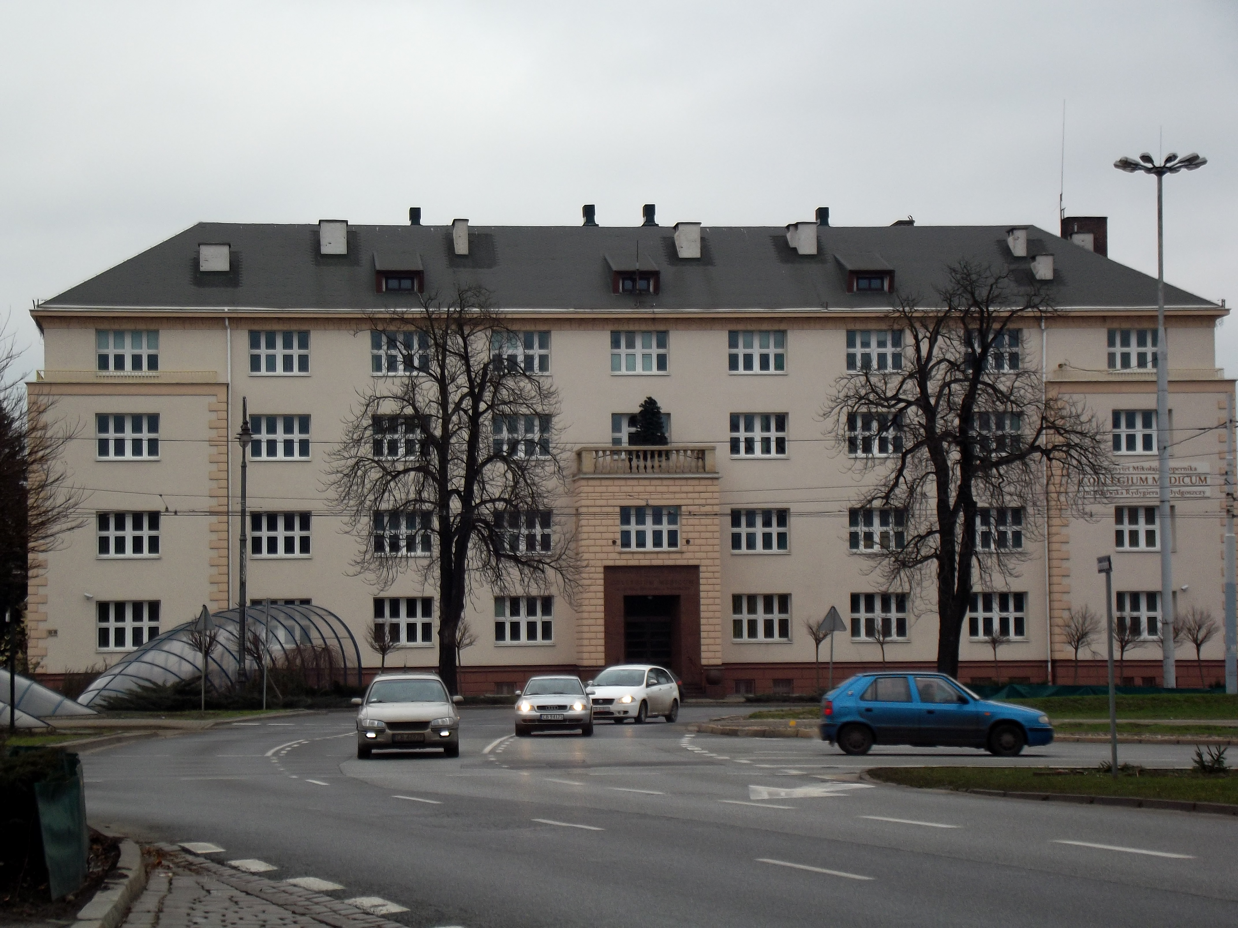 Collegium Medicum im. Ludwika Rydygiera UMK